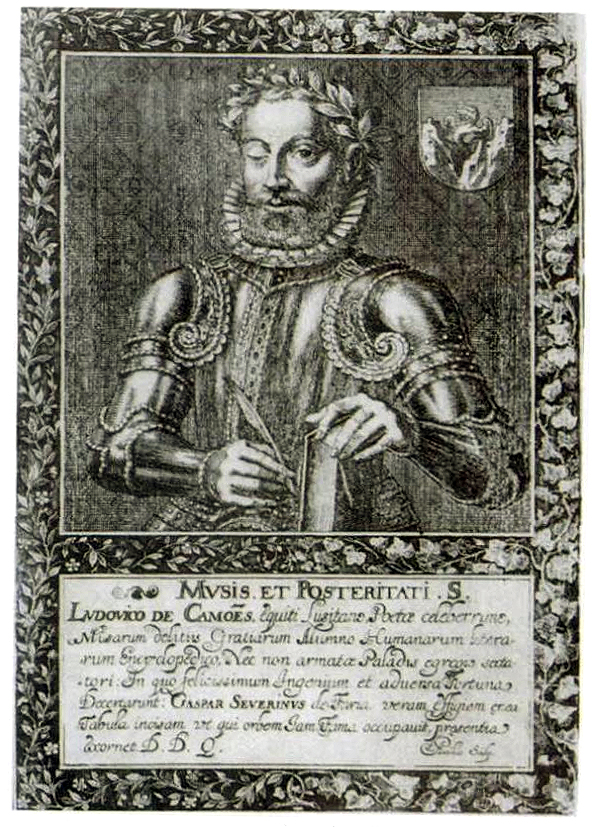 Busto de Camões